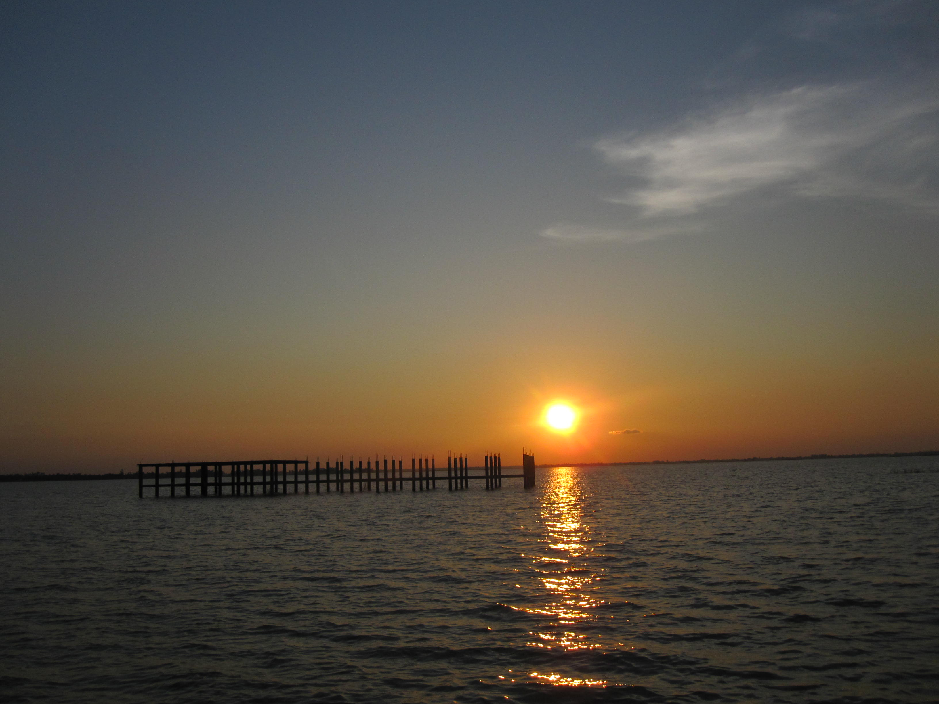 This Picture Shut Tour of Chalon Bil.